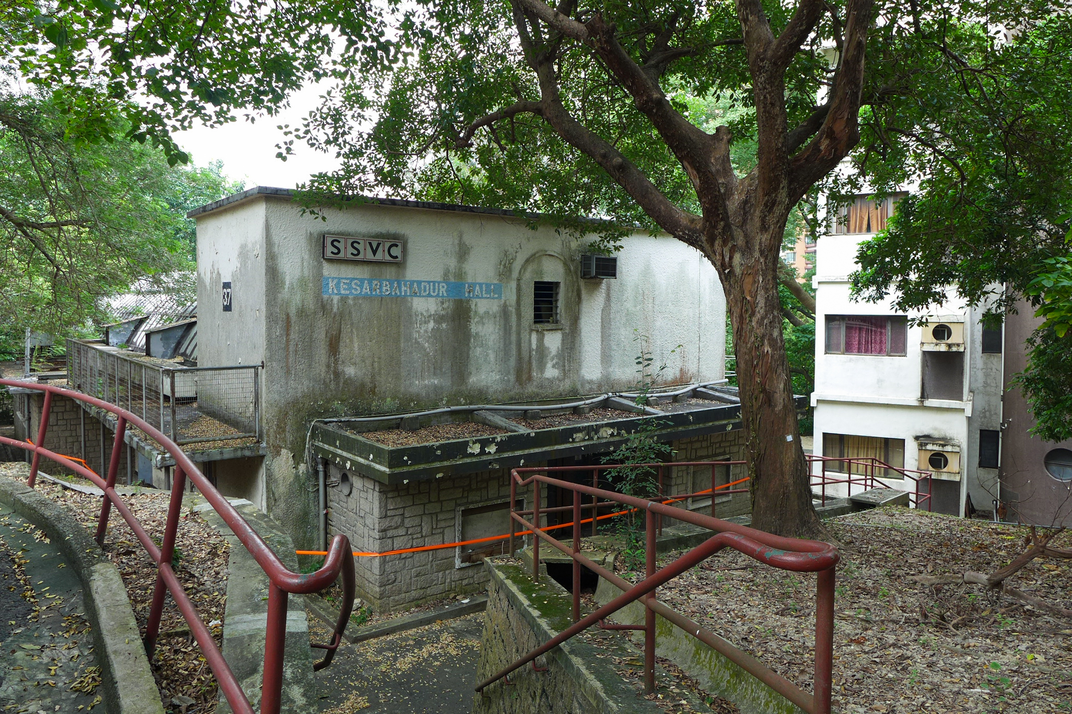 Perowne Camp Block 37 Kesarbahadur Hall